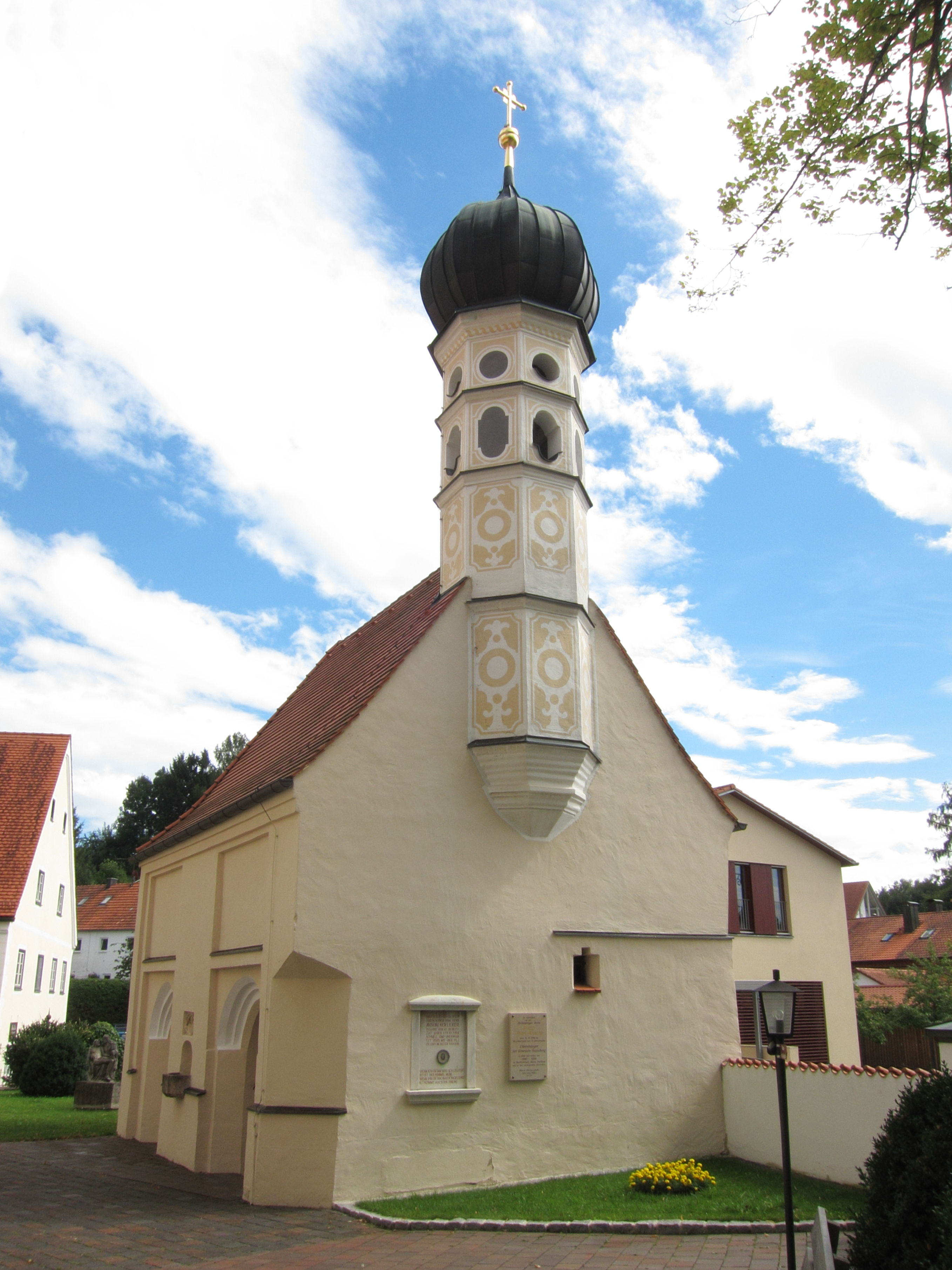 Maria Thalheim; Friedhofskapelle St. Michael, spätgotischer Saalbau mit barockem Dachreiter, Anfang 16. Jahrhundert; mit Ausstattung; Marienstatue, Skulptur aus weißem Marmor mit Granitsteinsockel und schmiedeeisernem Einfassungsgitter, um 1860.